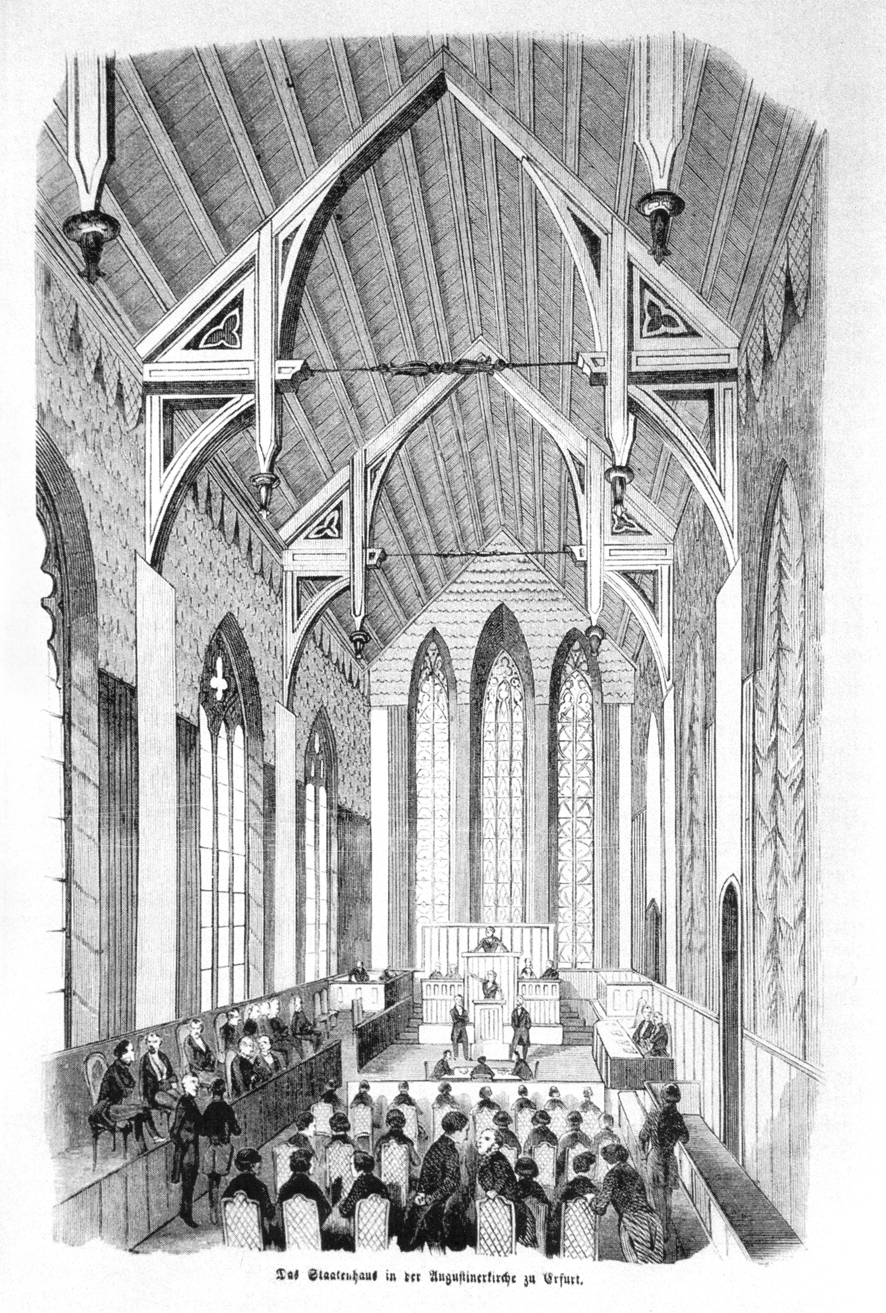 1850: Staatenhaus im Chor der Augustinerkirche Erfurt